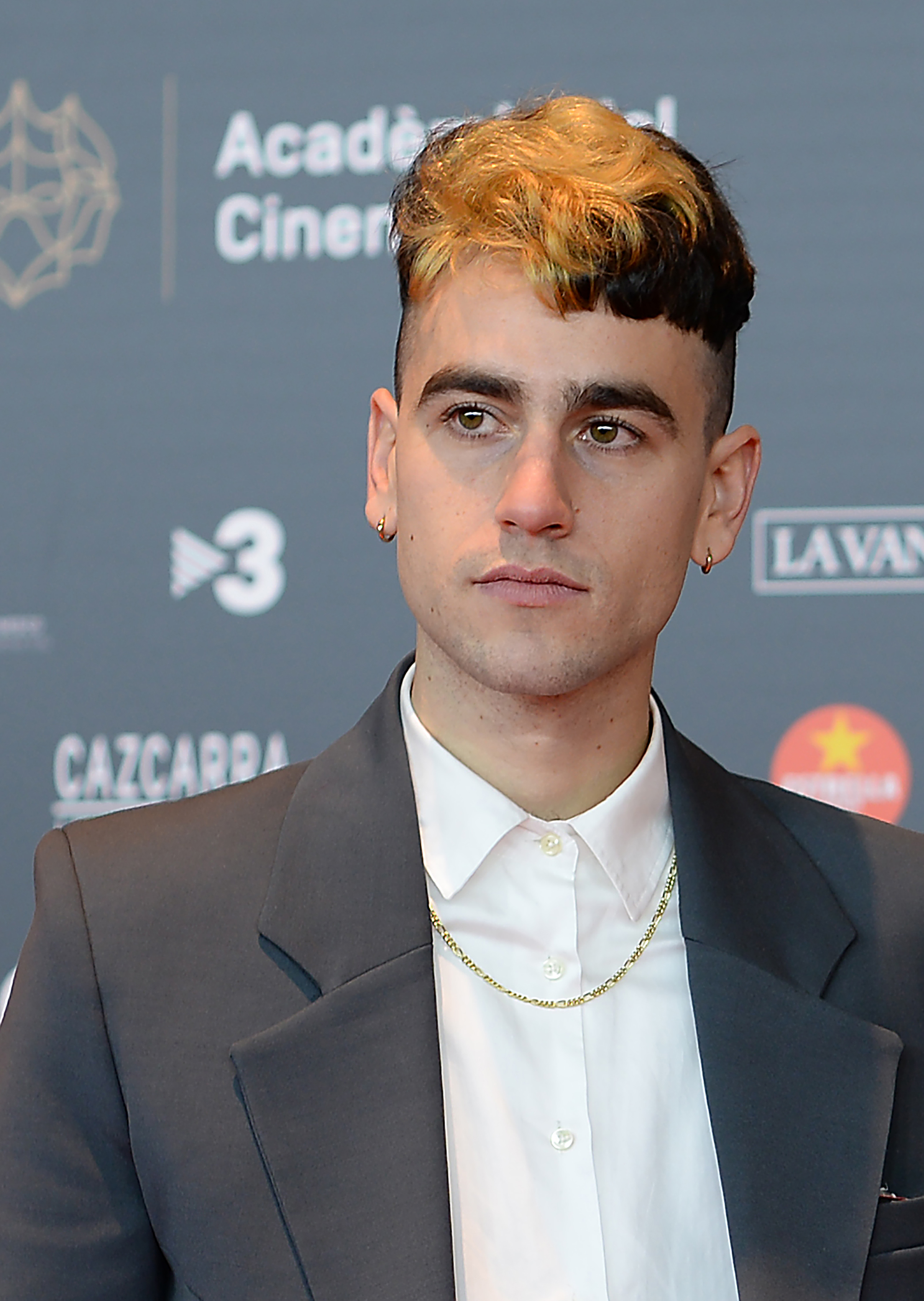 Àlex Monner, actor, XII Premis Gaudí (2020)